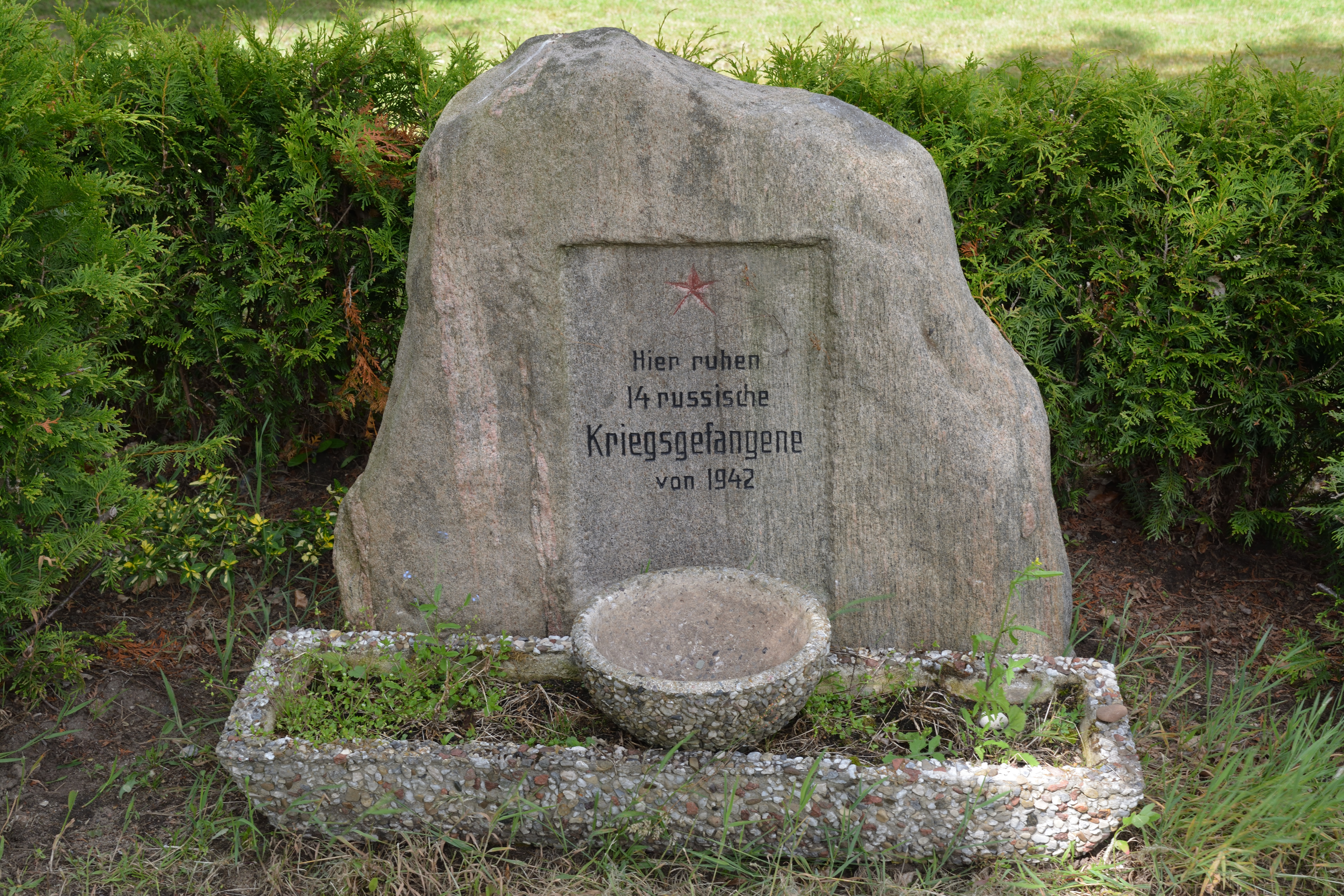 Kriegsgräber auf dem Friedhof von Alt Duvenstedt